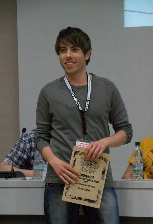 David Füleki als ICOM-Preisträger auf dem Comic-Salon Erlangen, Foto von Bernd Glasstetter (